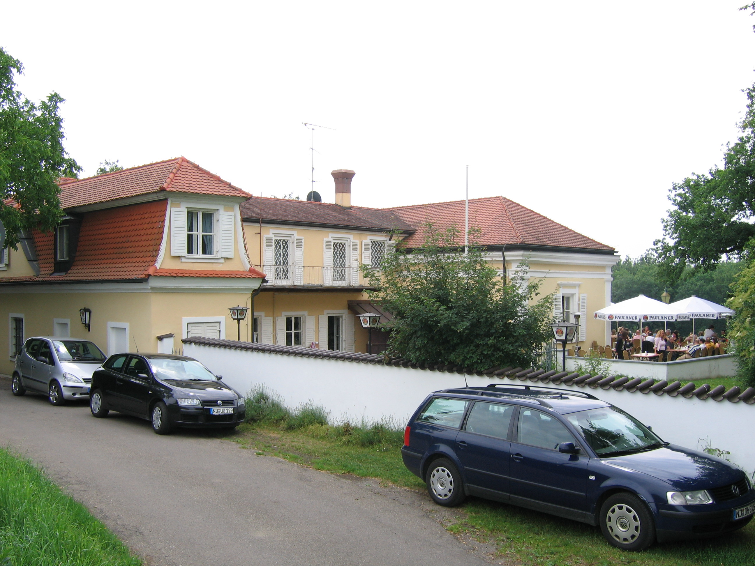 Das Arcoschlösschen in Neuburg an der Donau